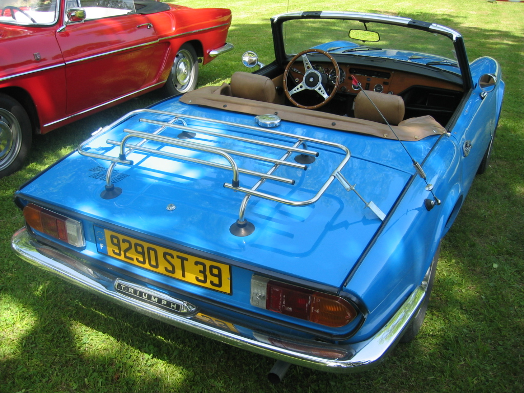 Triumph Spitfire 1500